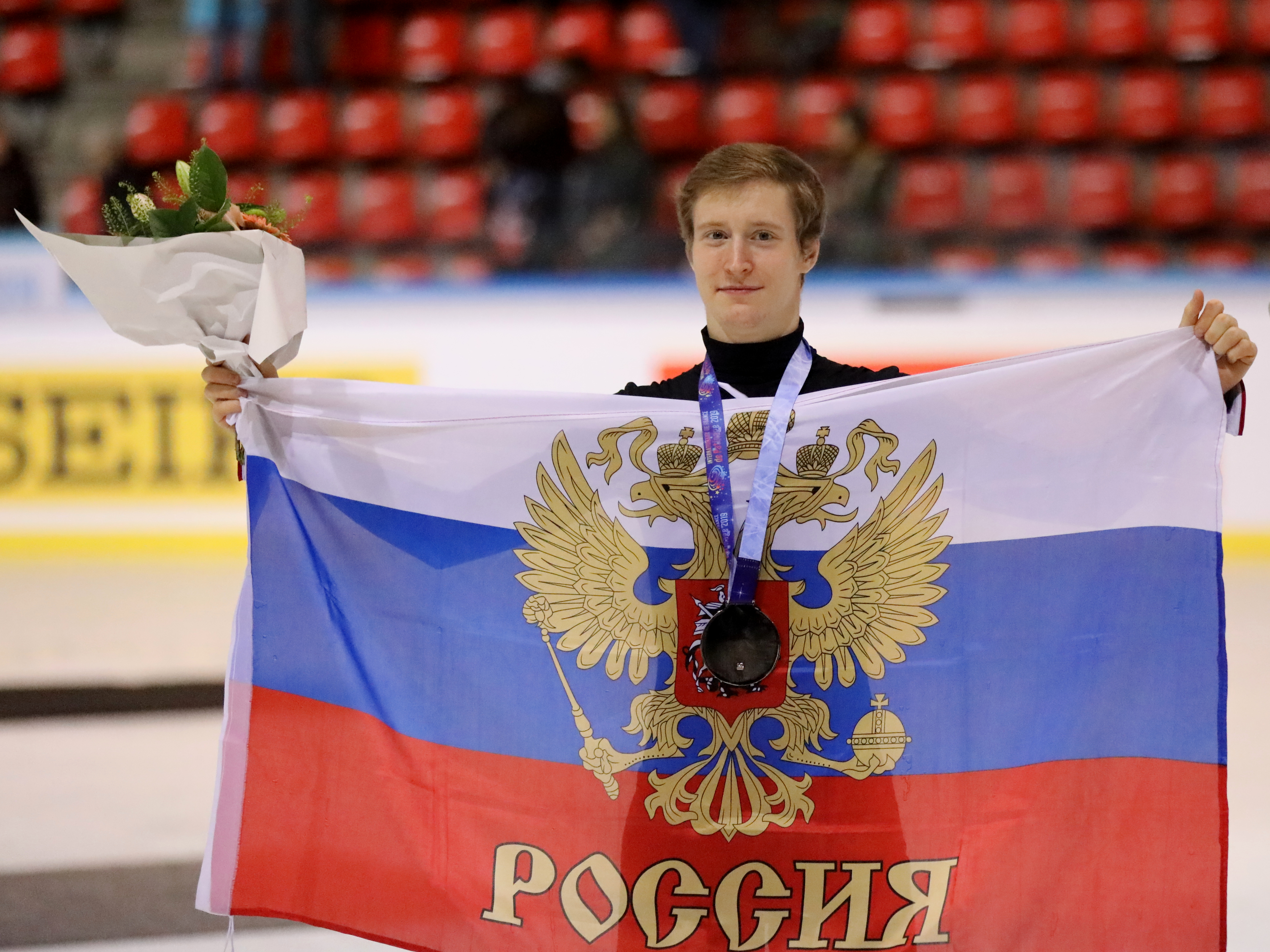 Internationaux de France 2019